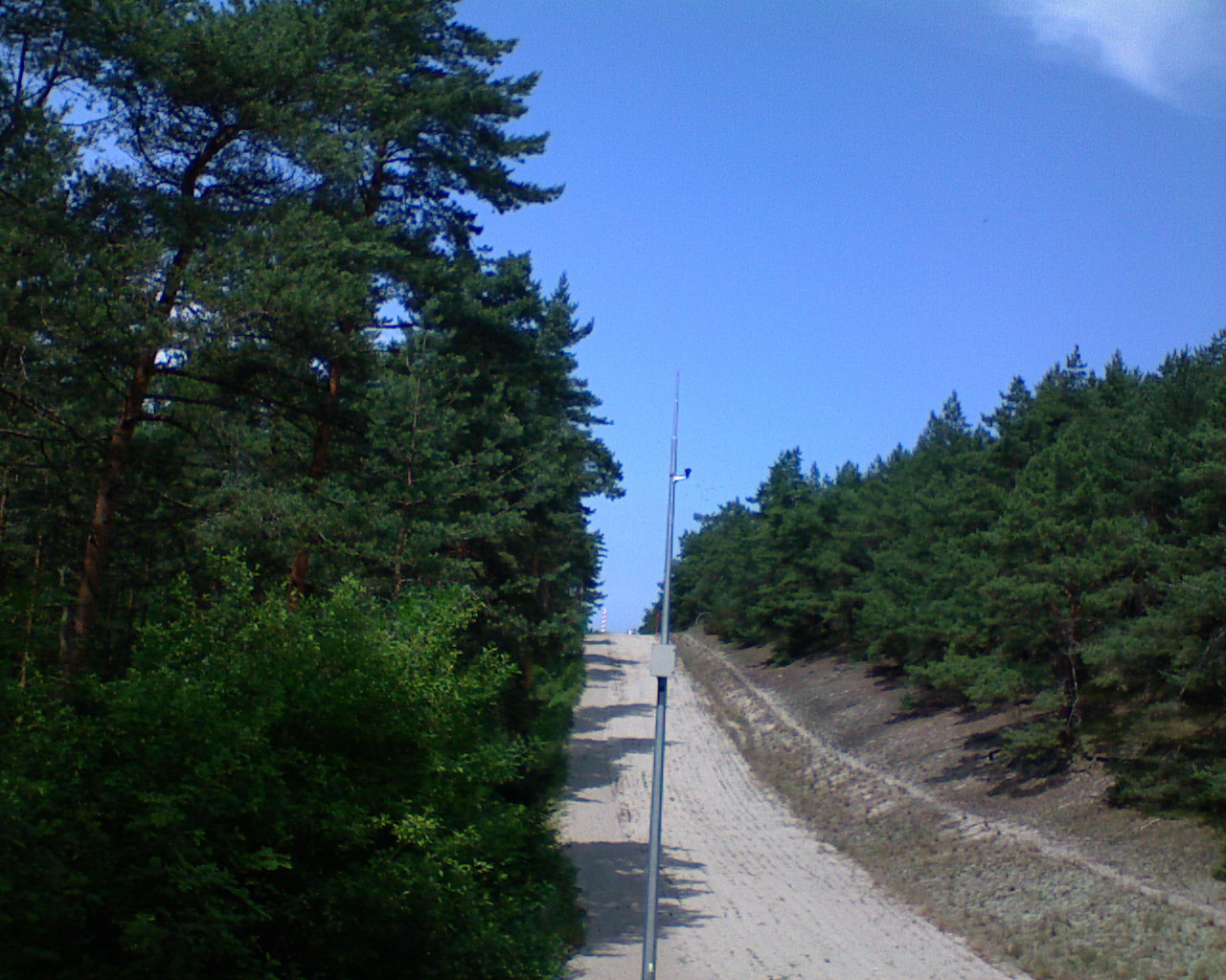 Pas drogi granicznej w Piaskach, dzielnicy Krynicy Morskiej